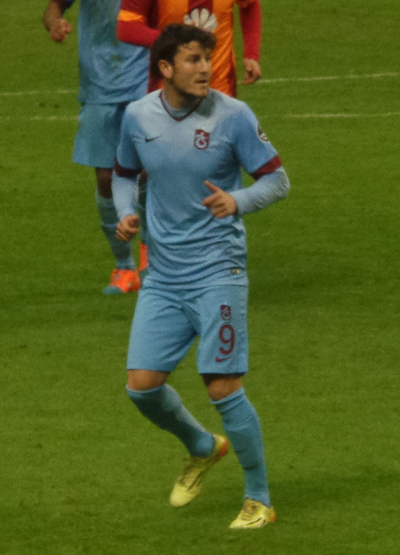 Sefa Yılmaz Galatasaray - Trabzonspor formasıyla